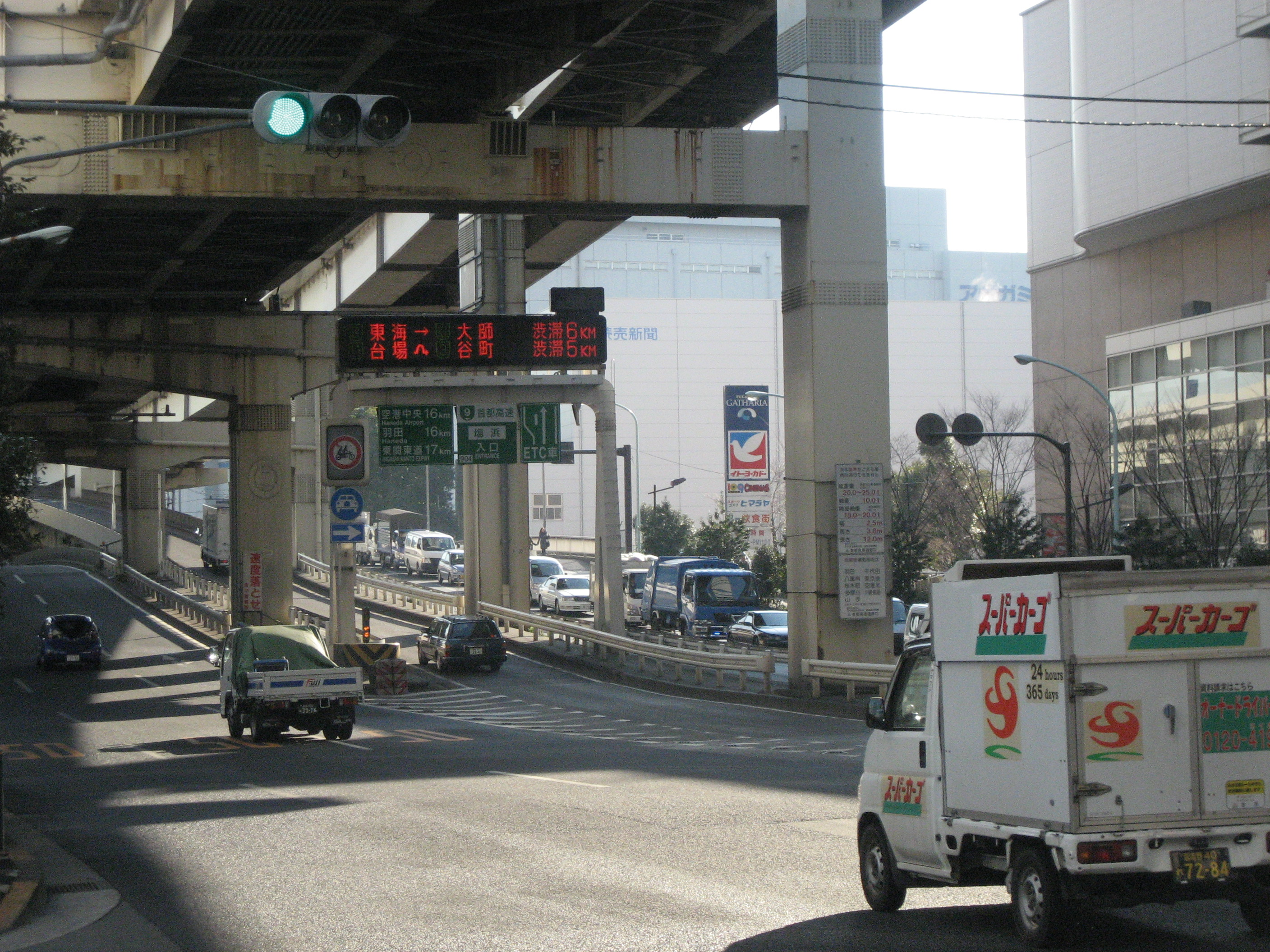 首都高速9号深川線塩浜入口